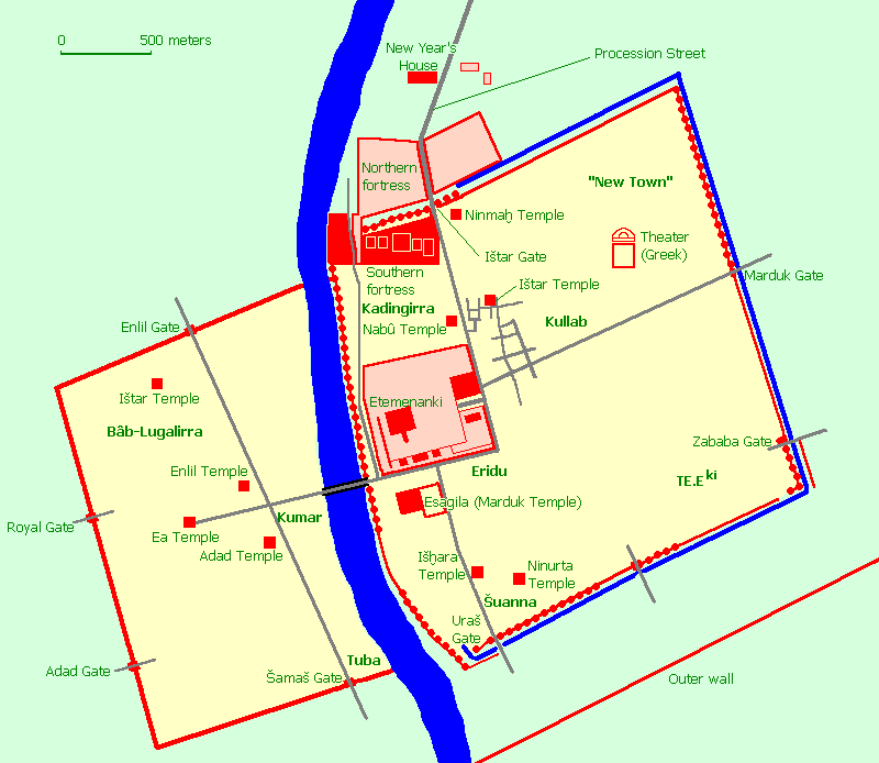 Stadtplan Babylons zeigt die Lage Esagilas. Fotograf: Marco Prins oder Jona Lendering Quelle: Die Autoren von erlauben die Publikation von Bildern, solange auf verwiesen wird ( Ursprünglich durfte auch keine Gebühr verlangt werden, dieser Missstand wurde aber per E-Mail (Ticket# 2006051810010757) ausgeräumt. --Flominator